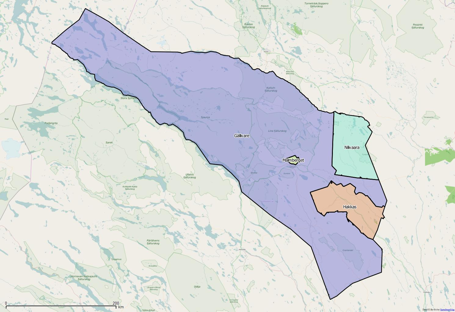 Distriktsindelningen i Gällivare kommun